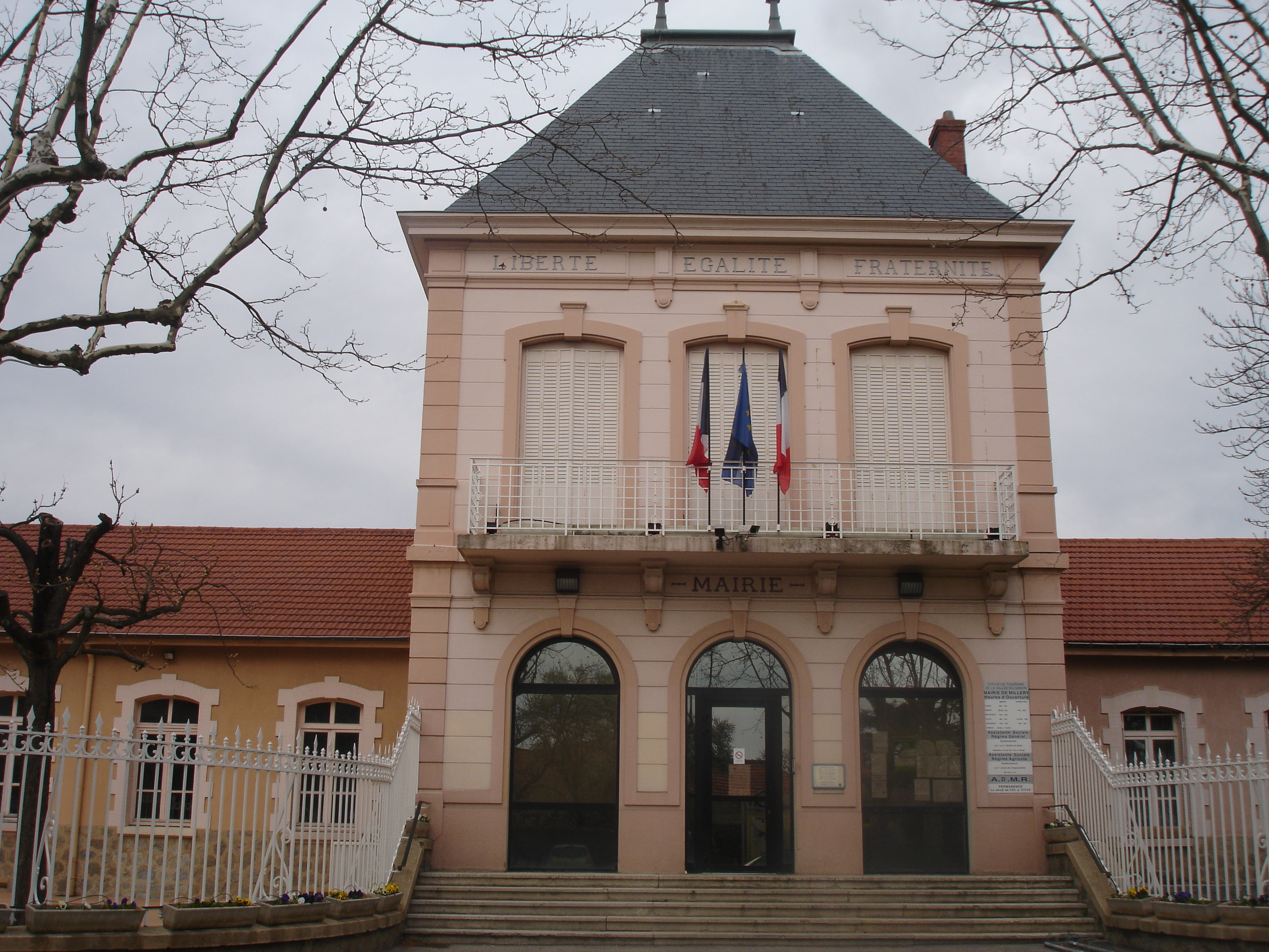 Millery (Rhône) : La mairie